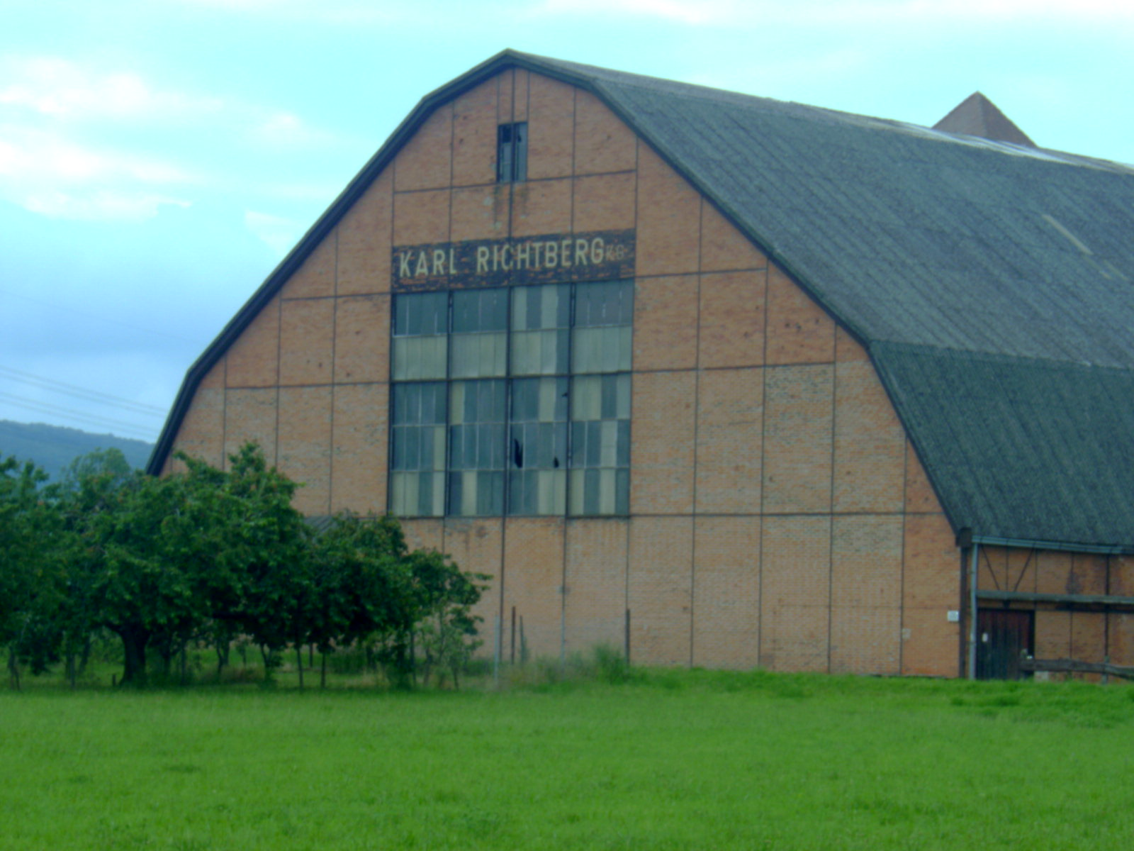 Halle Auggen aus Bestandteilen der Luftschiffhalle Baden-Baden Oos